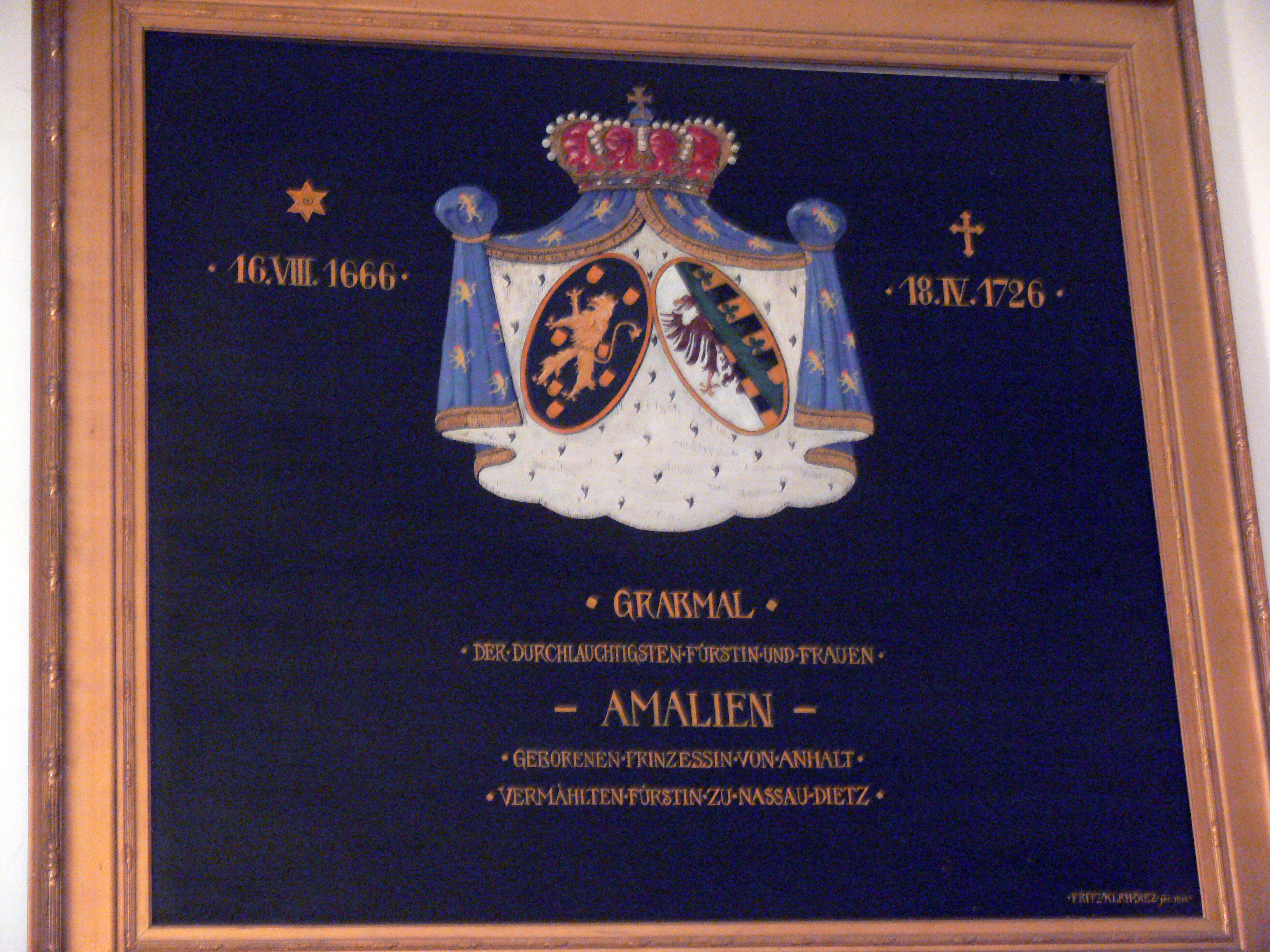 Wappen der Fürstin Amalie geborene Prinzessin von Anhalt vermählten Fürstin zu Nassau Diez. (16.8.1666—18.4.1726)